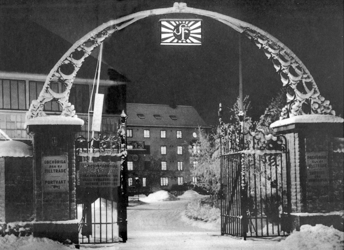 Portalen till Filmstaden i Solna på 1930-talet